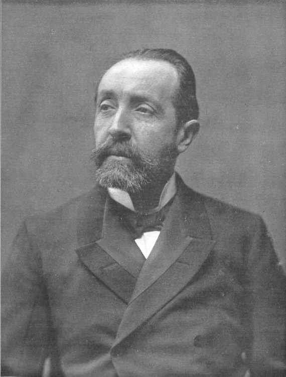 Fotografía de Bartomeu Robert, obra de Pablo Audouard.